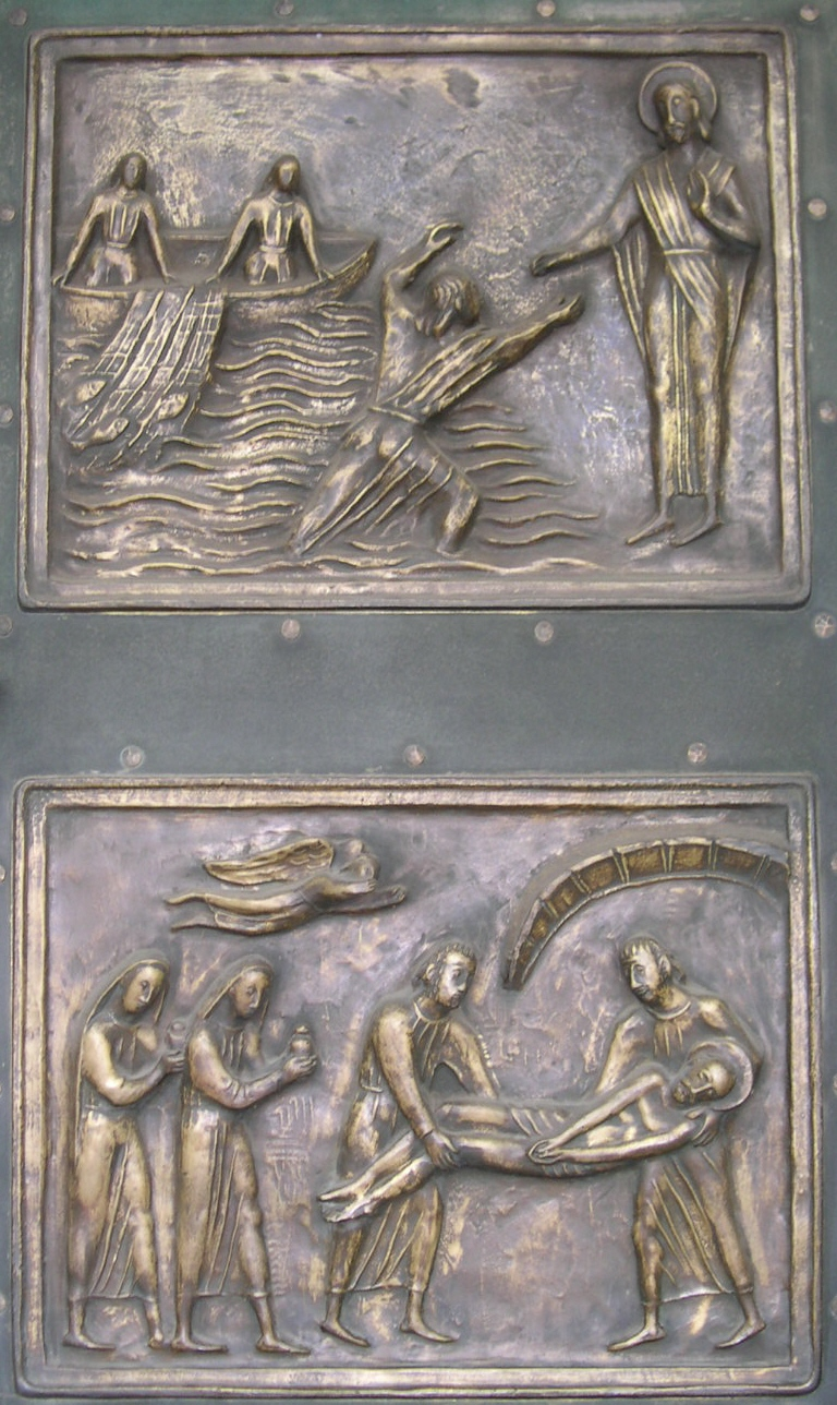 Zwei Bronzereliefs von Marcel Perincioli (1911–2005) oben auf dem rechten Flügel der Brückentüre der Nydeggkirche in Bern: der Auferstandene am See Tiberias (Johannes 21,1-14) und die Grablegung Jesu (Johannes 19,38-42)